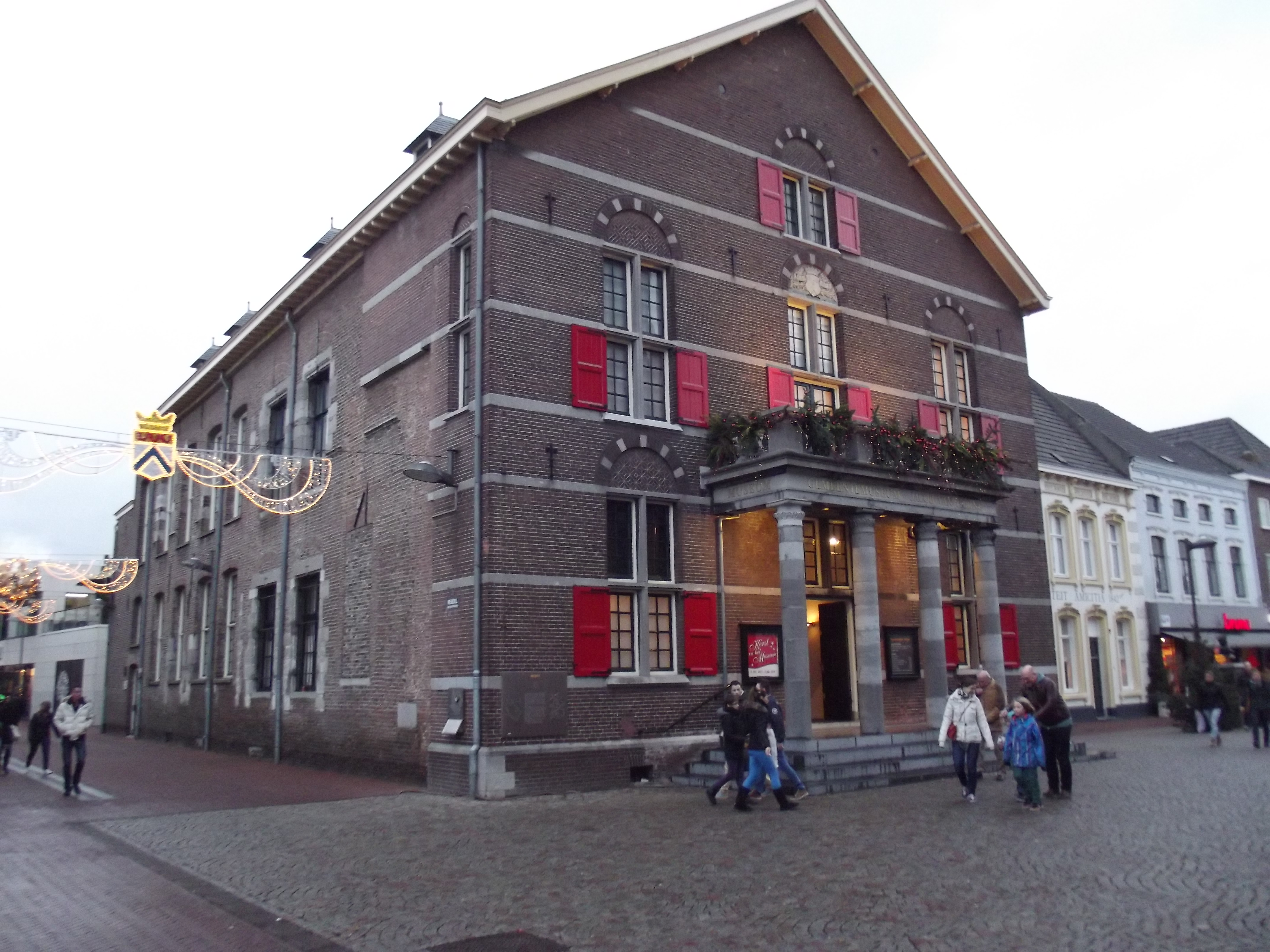 Voormalig raadhuis, nu gemeentemuseum Jacob van Horne.